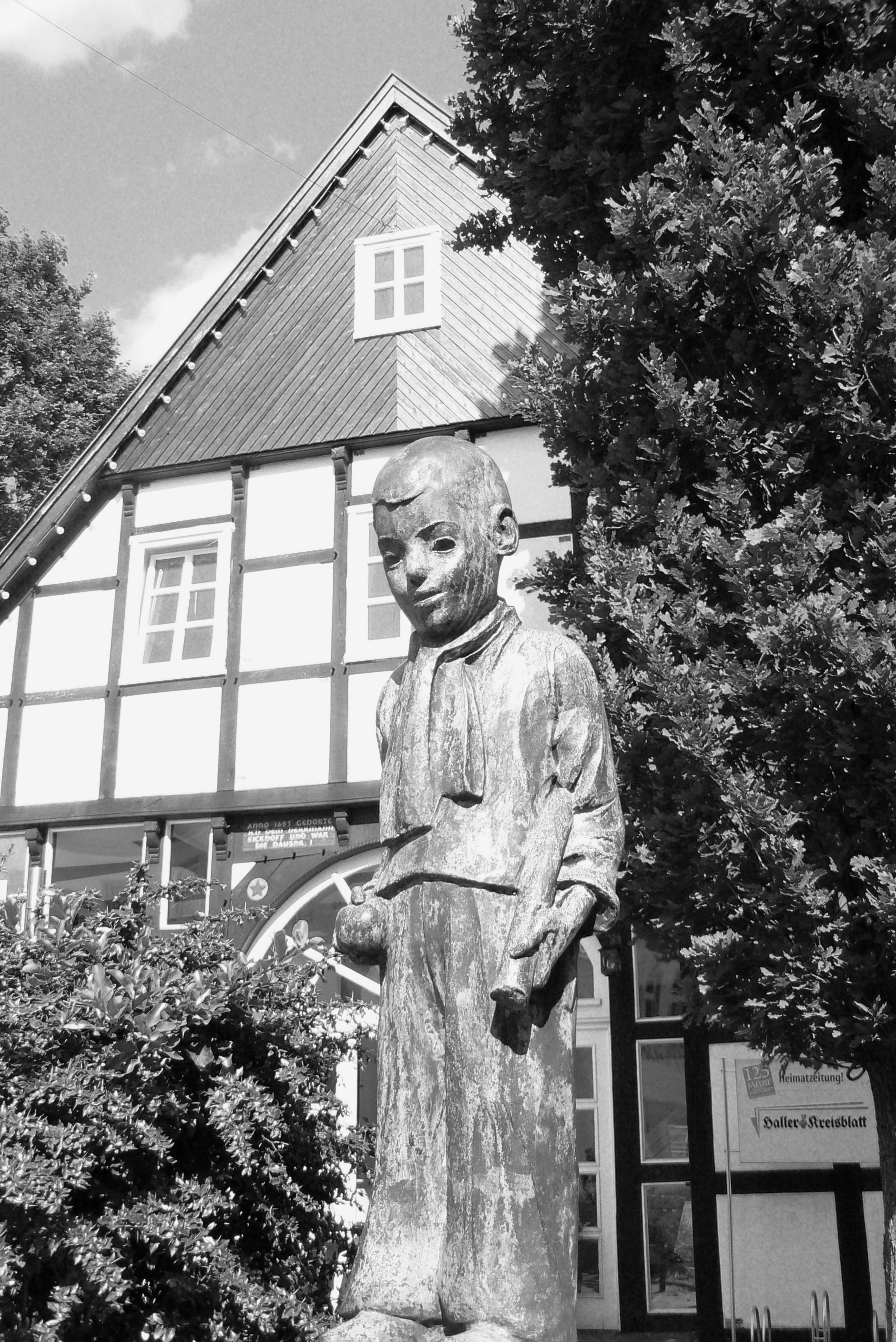 Peter August Böckstiegel, Bauernjunge, Skulptur von 1935, Werther